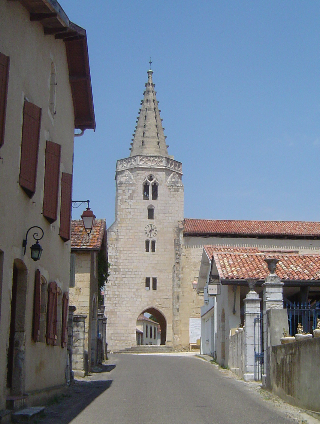 Campanèr, pòrta de vila ; Brassempoi (França)